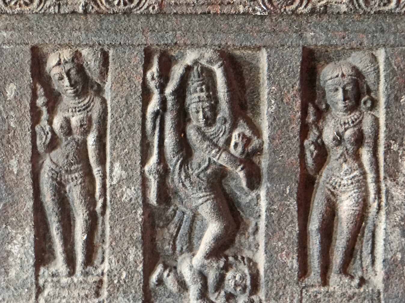 Décor du temple d’Airavateshwara à Darasuram montrant Shiva dansant dans une variante de la pose canonique Lalata Tilaka Les grands temples vivants de la dynastie des Chola, classés sur la liste du patrimoine mondial de l'UNESCO, datent des XIe et XIIe siècles, ce sont : le temple de Brihadisvara de Thanjavur, le temple de Brihadisvara de Gangaikondacholisvaram et le temple d’Airavatesvara (Airavateshwara) de Darasuram. Ils sont situés dans l'Etat du Tamil Nadu en Inde du sud. Ces temples, caractéristiques de l'art dravidien médiéval tardif, témoignent des brillantes réalisations de l’ère Chola en architecture, peinture, sculpture et statuaire en bronze. Le temple d’Airavatesvara, érigé par Rajaraja II (1150-1175) à Darasuram, comporte un vimana de 24 m, il est dédié à Shiva. Le complexe du temple d’Airavatesvara a été entièrement construit en une seule fois, sans que des structures soient ajoutées ultérieurement, et il a gardé sa forme originelle. Comme les autres temples, il possède de nombreuses sculptures d'une grande qualité (extraits du site de l'UNESCO)